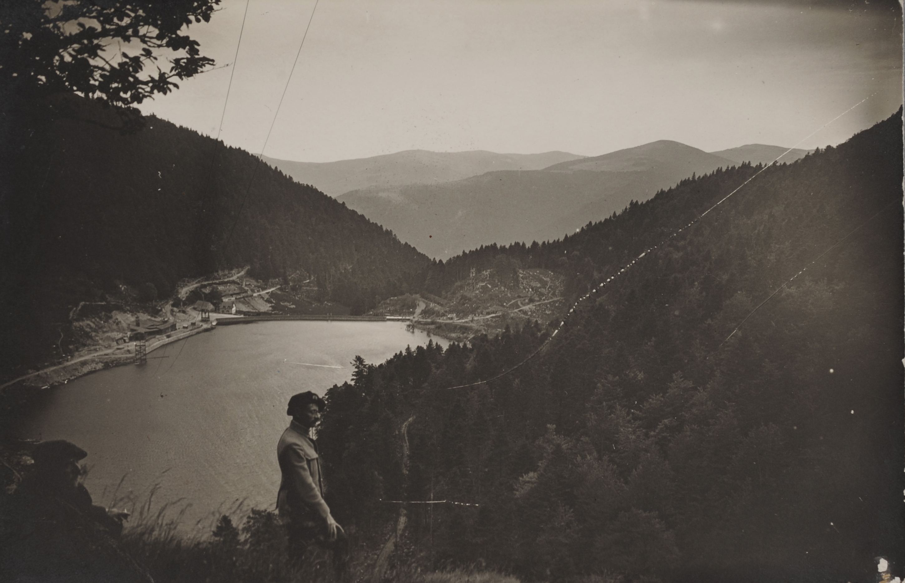 Le général Louis Marie Gaston d'Armau de Pouydraguin inspecte le téléphérique descendant du Hohneck (Massif des Vosges) au lac de Schiessrothried (Haut-Rhin). (1916-1917)